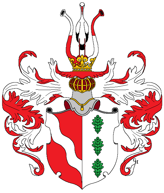 Wappen des kaiserlichen Hof- und Kriegsrates Georg Michael Schlümbach (1724–1794), aus württembergisch-fränkischer Familie stammend, verliehen anlässlich seiner Erhebung in den Reichsadelsstand 1761. Zeichnung von Gerd Hruška (